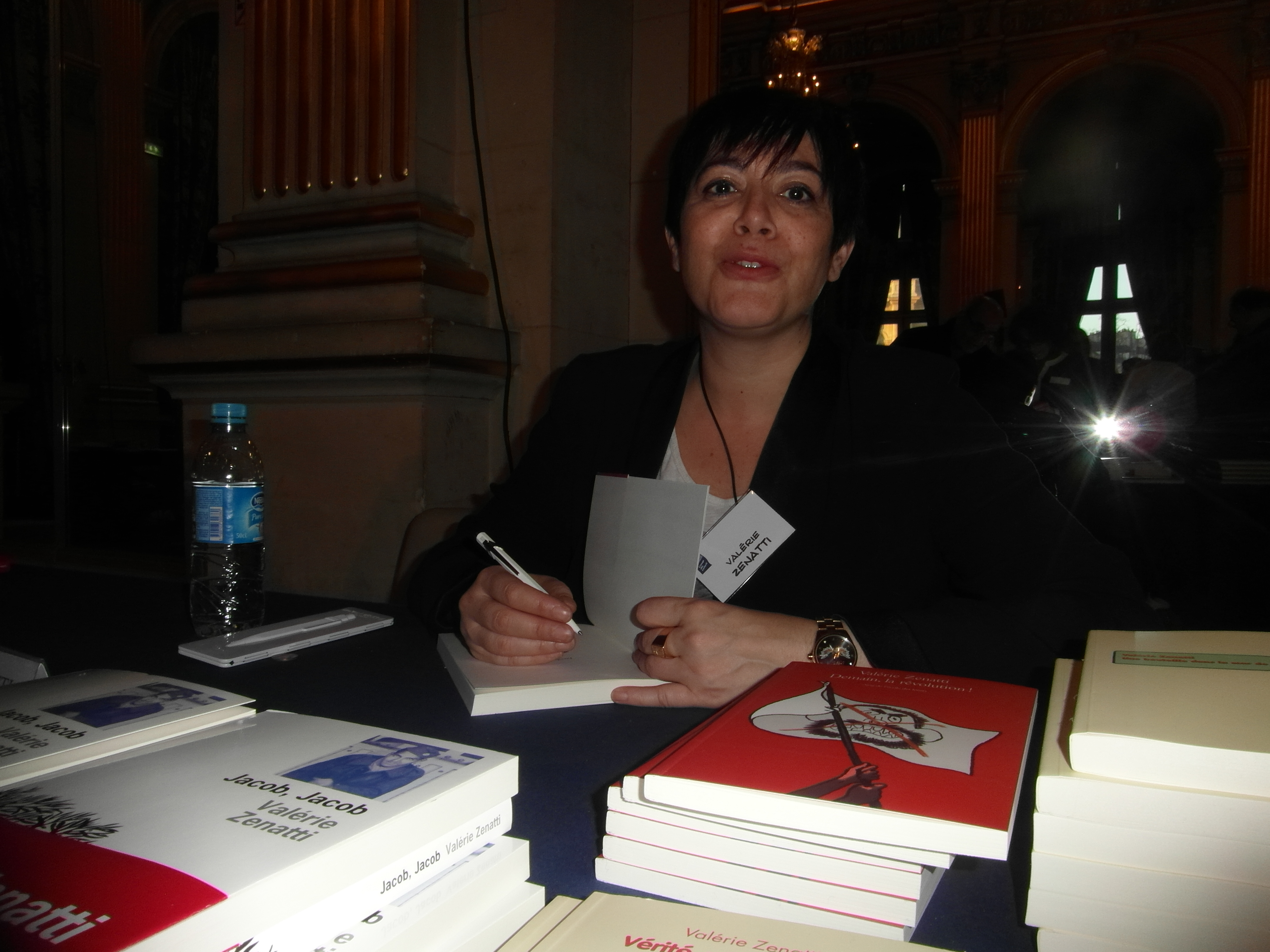 Maghreb des Livres, 7 et 8 février 2015